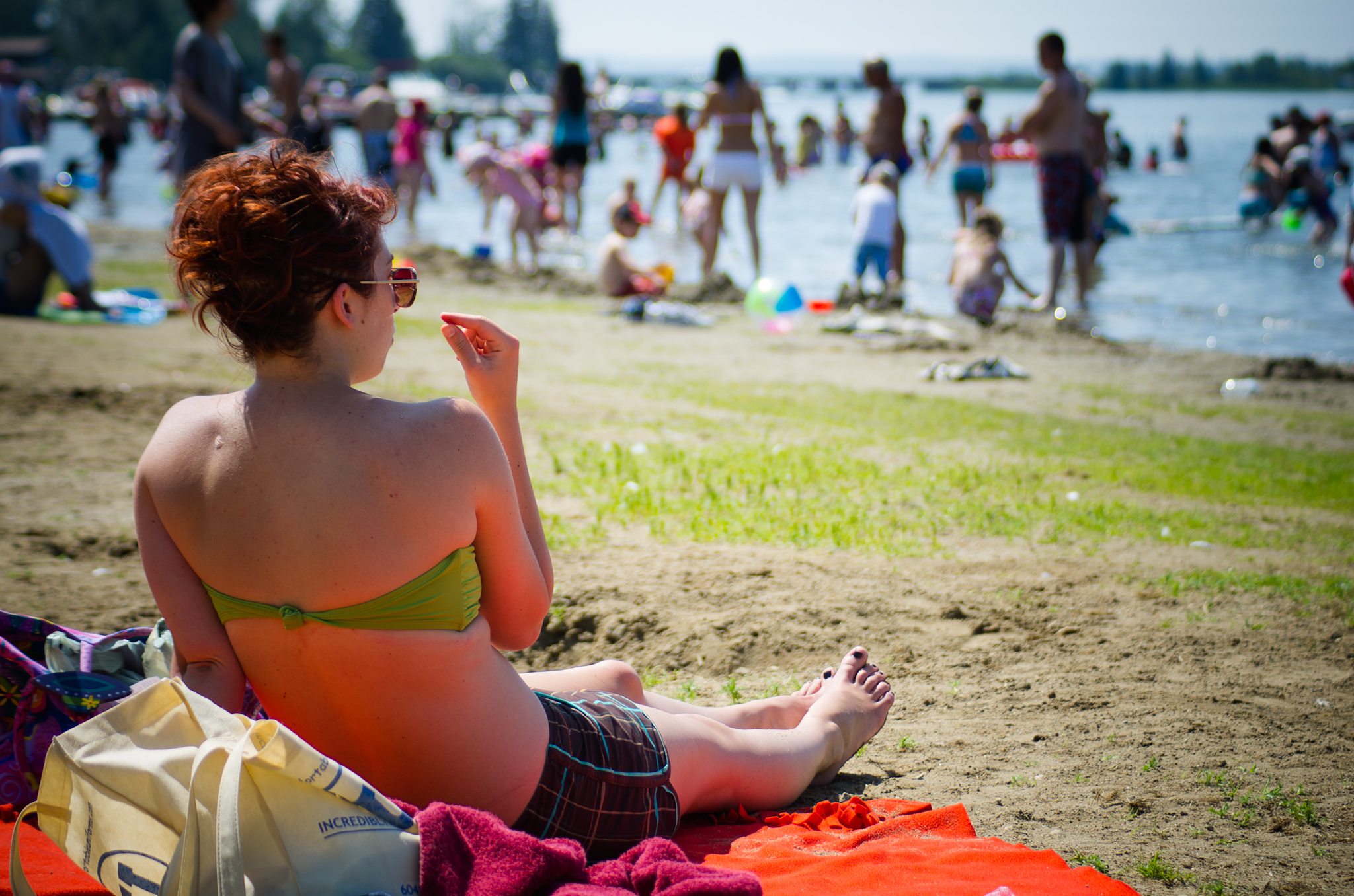 Beach Snacking